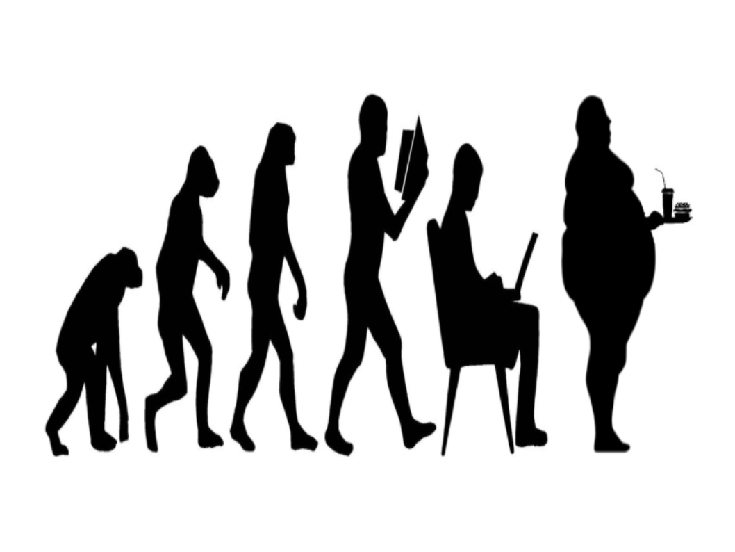 Parodie de la marche du progrès : du singe à l'homme moderne obèse.